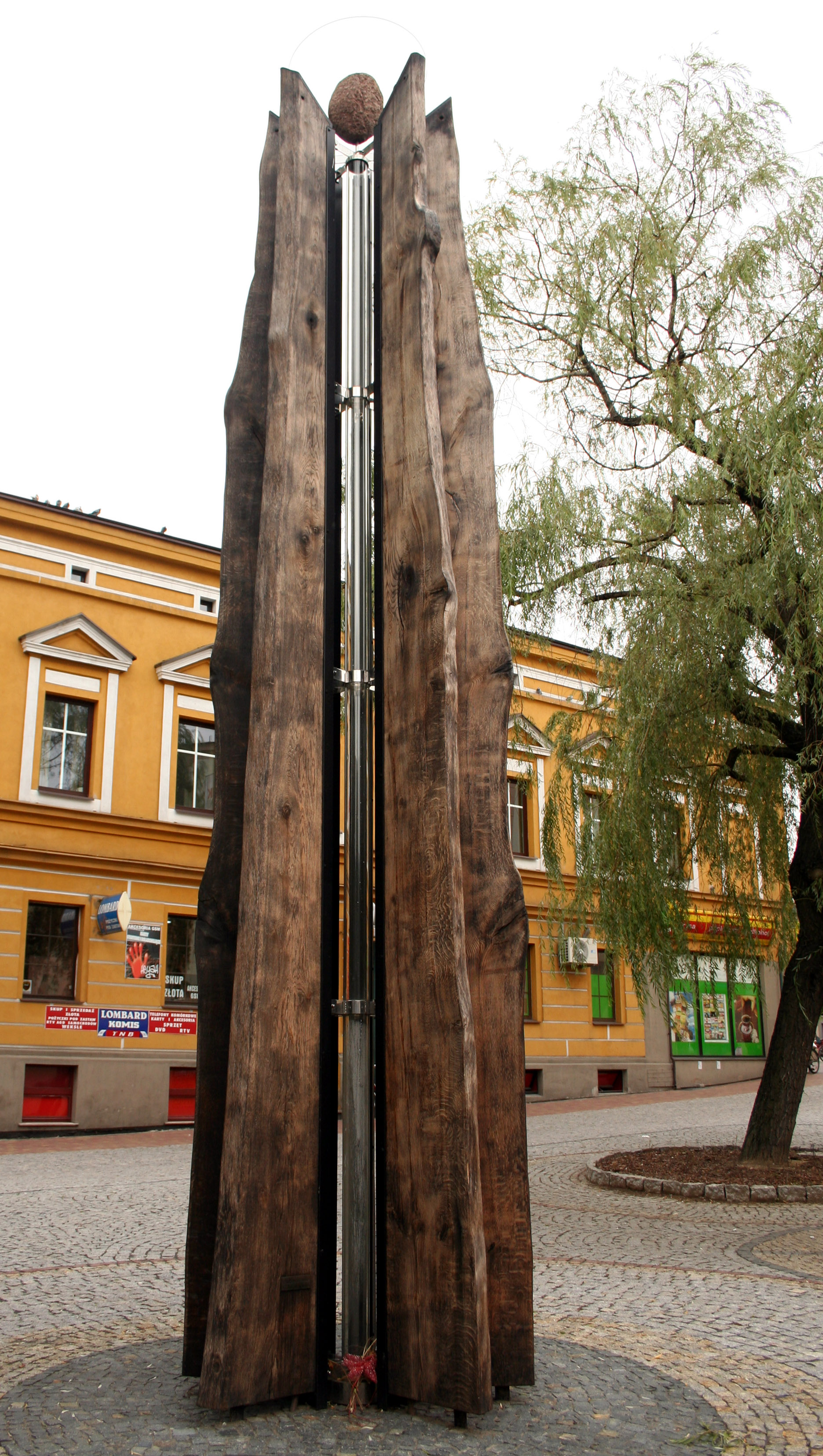 pomnik Edyty Stein w Lublińcu